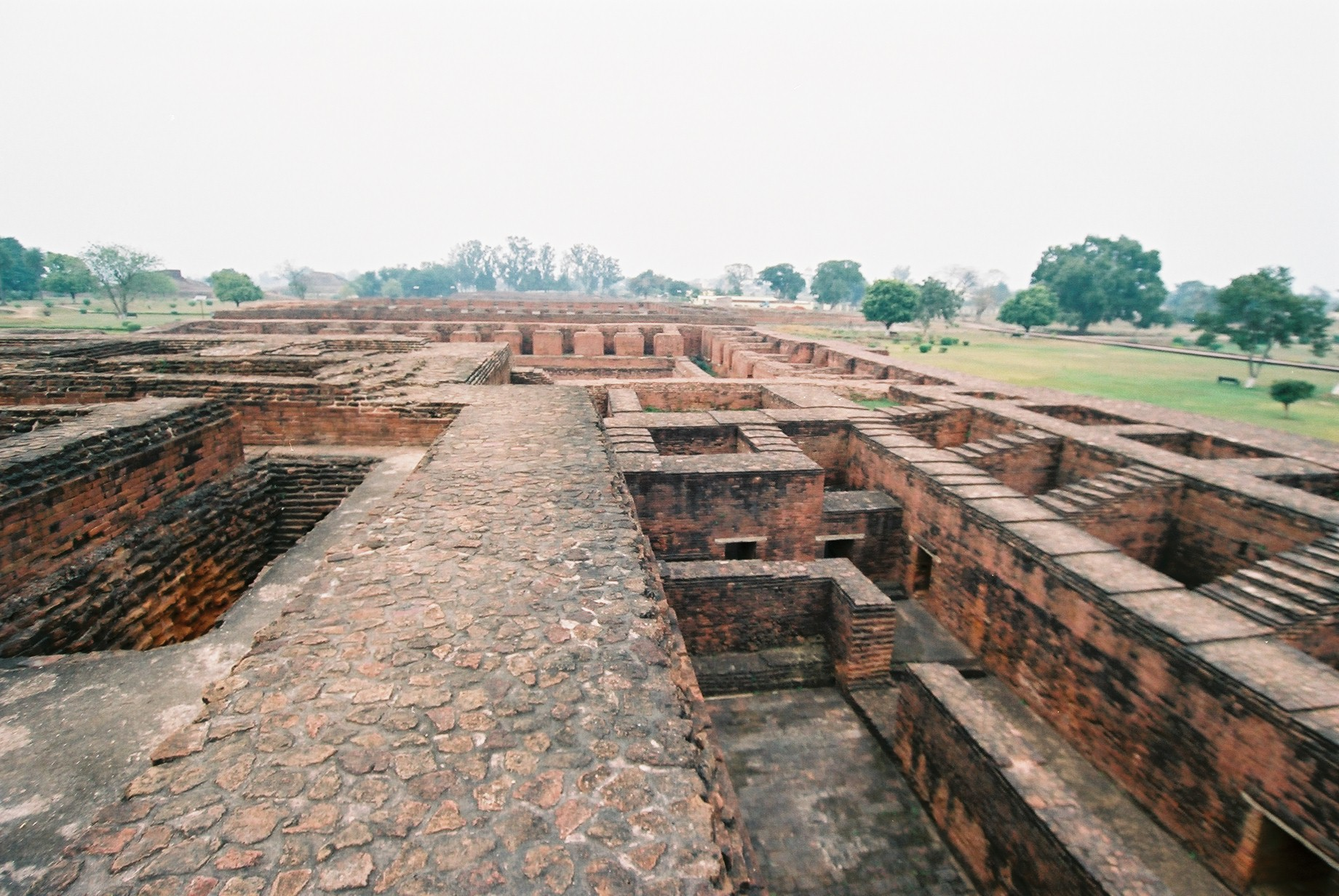 発掘されているのはまだほんの一部らしいのですが、とにかく広大な遺跡です。 ７世紀に唐の玄奘(三蔵法師)が滞在(最初は学僧だったけど、最後は教師になりました)していた頃は、１万人規模の大学だったようです。 (2005/01/24 Nalanda, Bihar, INDIA)